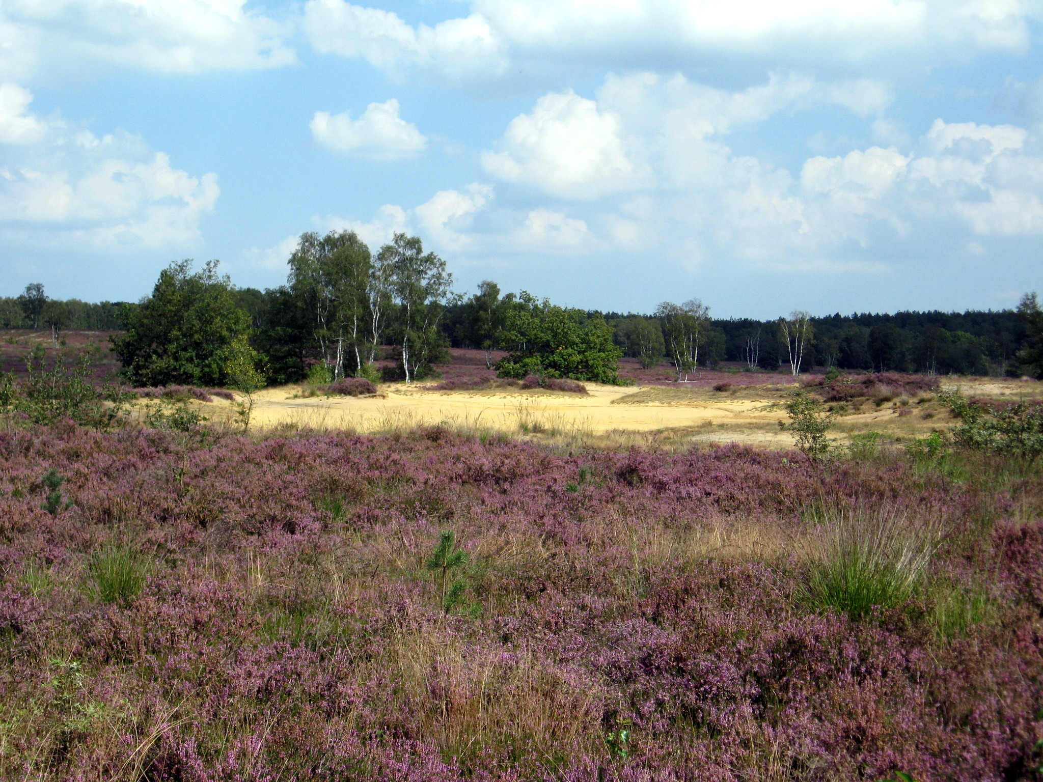 De Molenheide in Zonhoven; sinds 1995 beschermd erfgoed